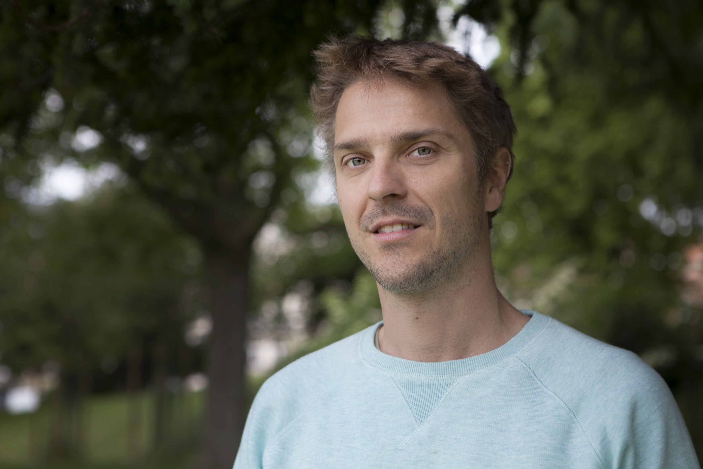 Portrait d'Olivier Magis